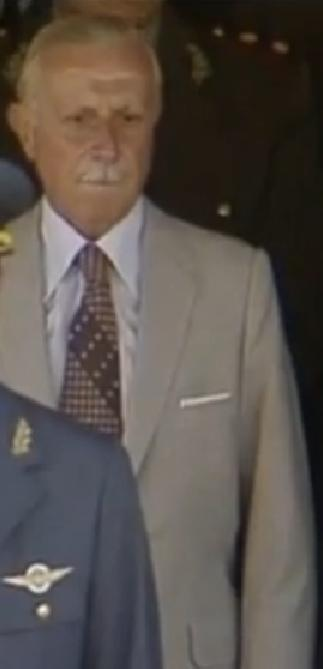 Brigadier General Basilio Arturo Ignacio Lami Dozo, durante un acto conmemorativo del Proceso de Reorganización Nacional el 24 de marzo de 1982 Ver Vídeo..